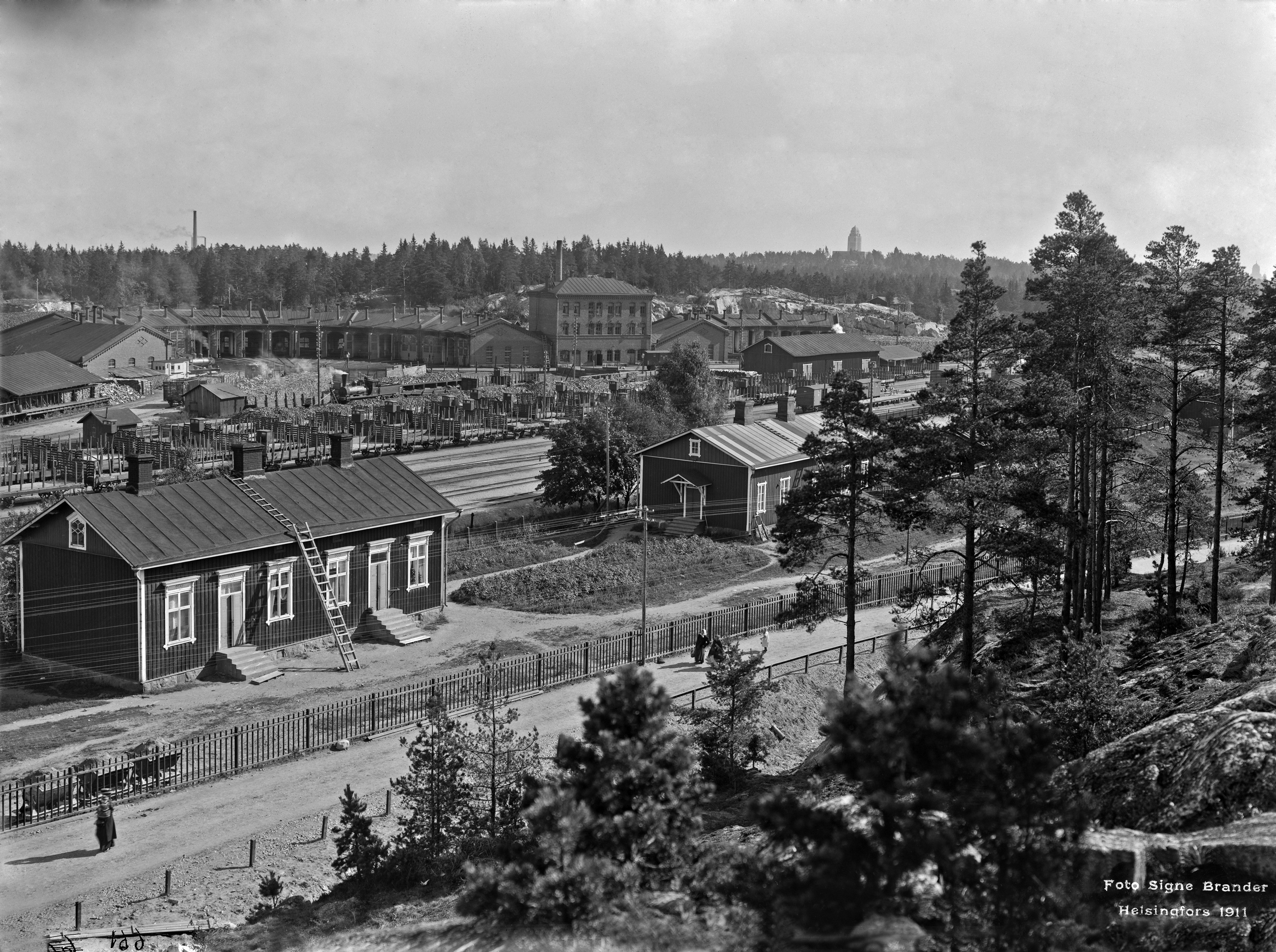 Pasilan veturitallit vuonna 1911